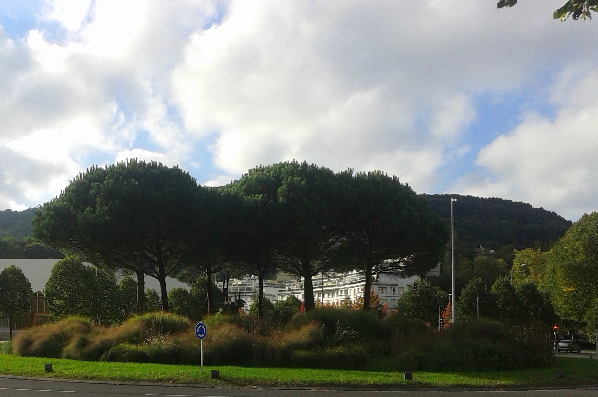 Plaza erdian Andres Nagelen eskultura dago.